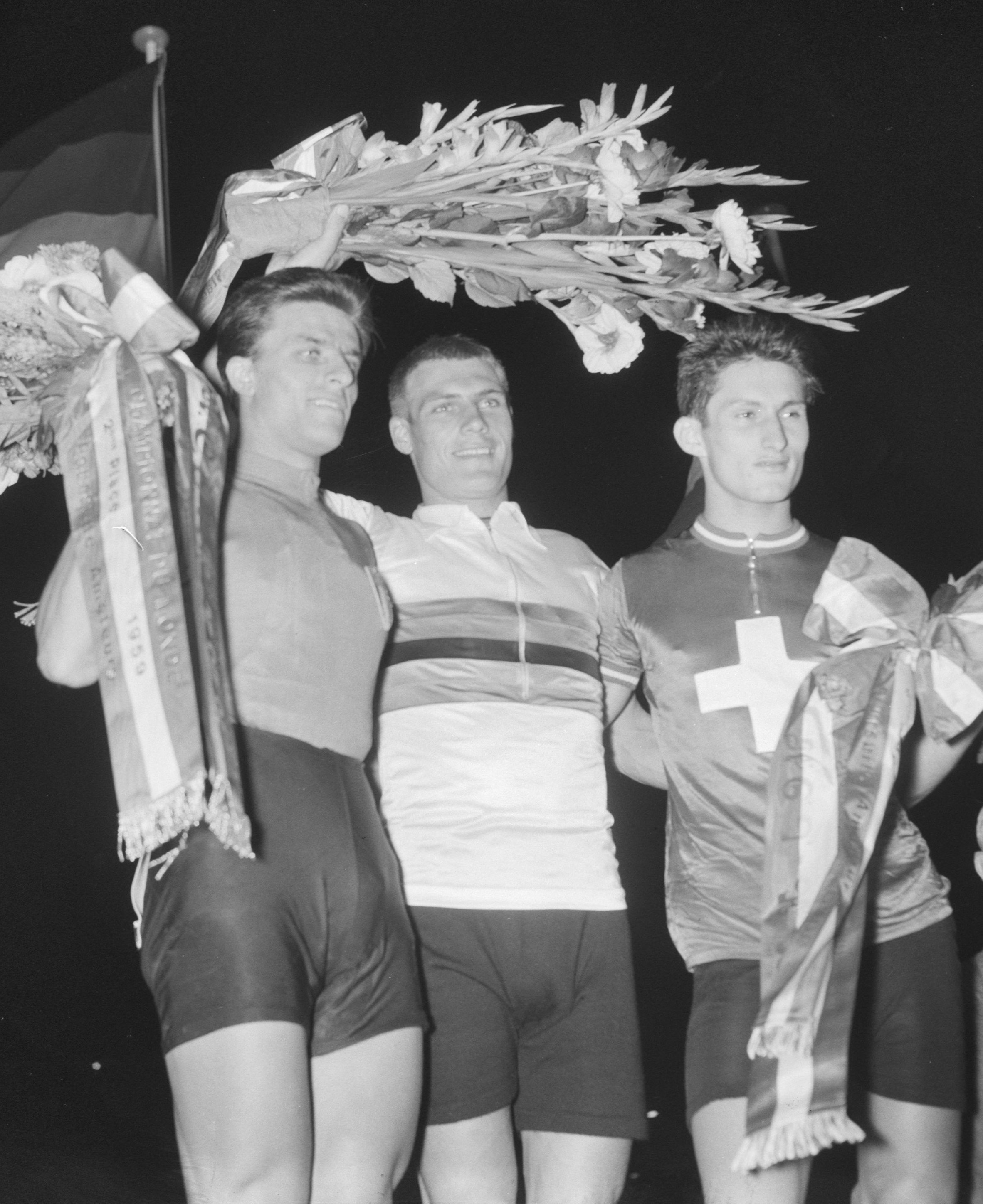 Wereldkampioenschap wielrennen op de baan in Amsterdam. Achtervolging Amateurs. v.l.n.r. Mario Valotto (It.) 2e , Rudi Altig (Dld) 1e en Walter Trepp (Zw.) 3e